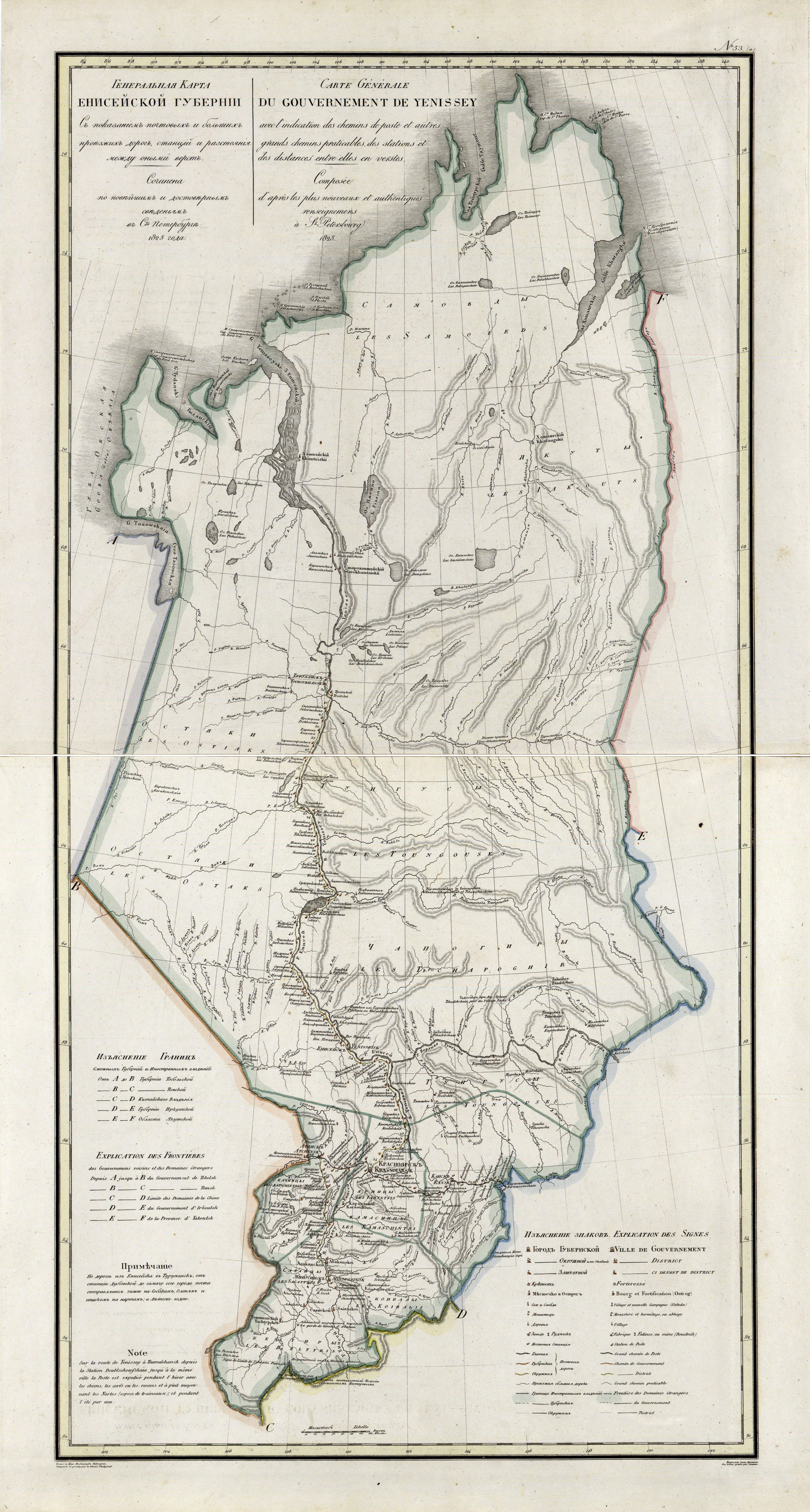 Географический атлас Российской империи, Царства Польского и Великого княжества Финляндского расположенный по губерниям на русском и французском языках. 1821 год. Енисейская Губерния. Генеральная карта. 1825 год.